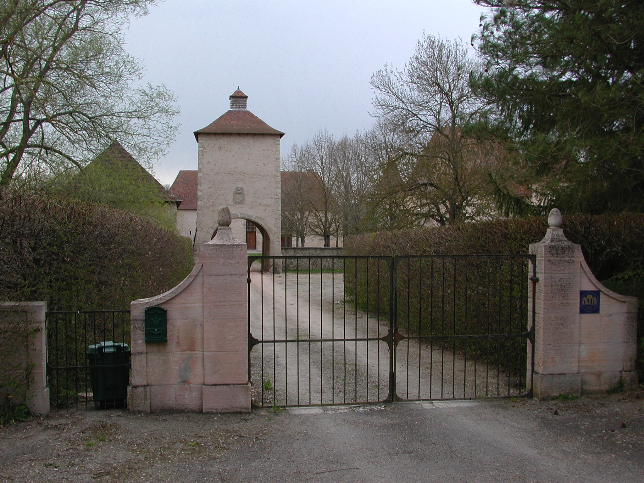 Chareil-Cintrat (Allier, France). Entrée du château de La Rivière.